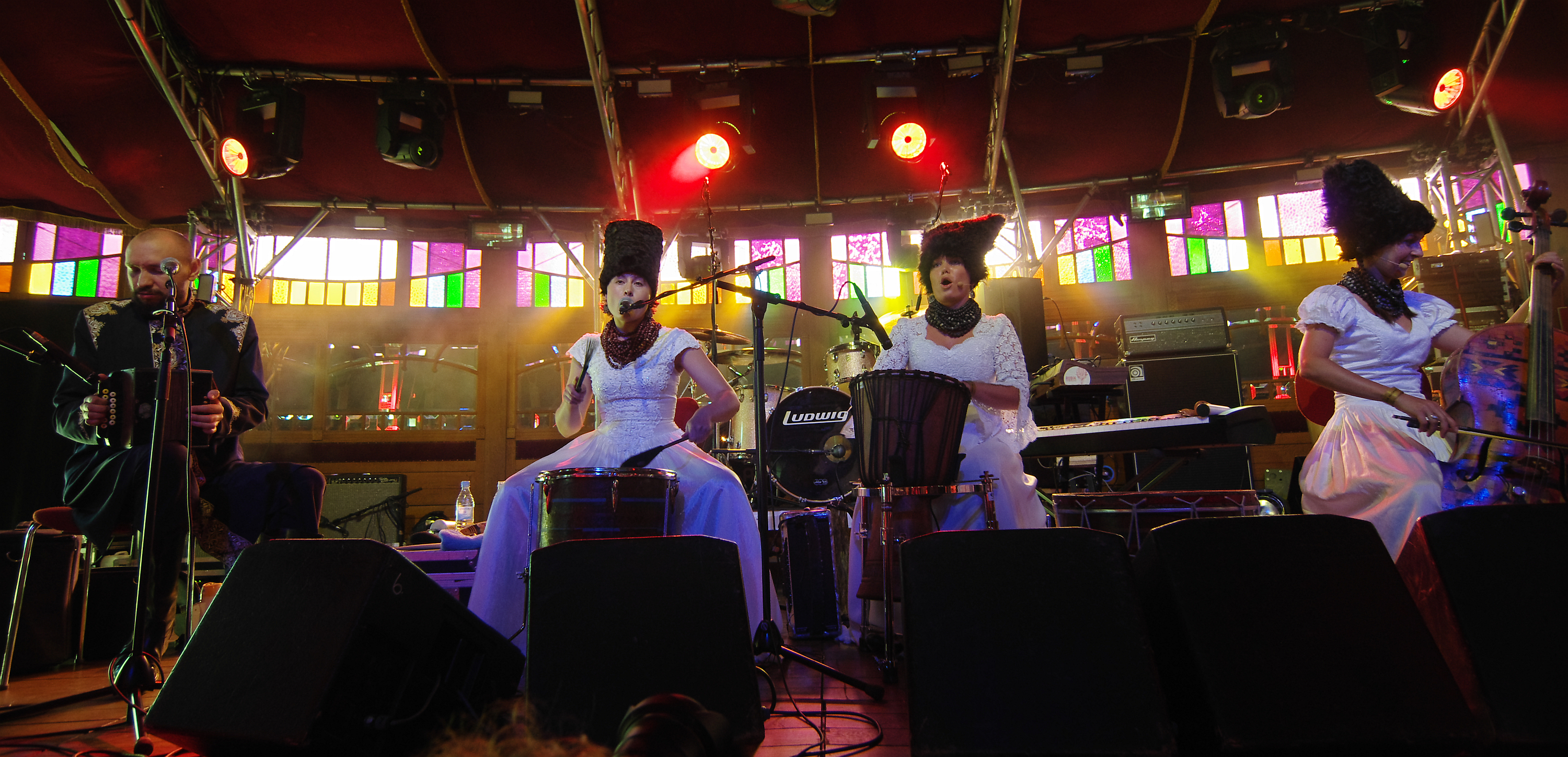 DakhaBrakha aus Kiew, Ukraine, beim Haldern Pop Festival 2013. Besetzung: Marko Halanevych (Gesang, Darbuka, Tabla, Didgeridoo, Posaune, Akkordeon), Nina Garenetska (Gesang, Cello, Schlagzeug), Irina Kovalenko (Gesang, Percussion, Dudelsack, Flöte, Akkordeon), Elena Tsybulskaya (Gesang, Percussion, Mundharmonika).